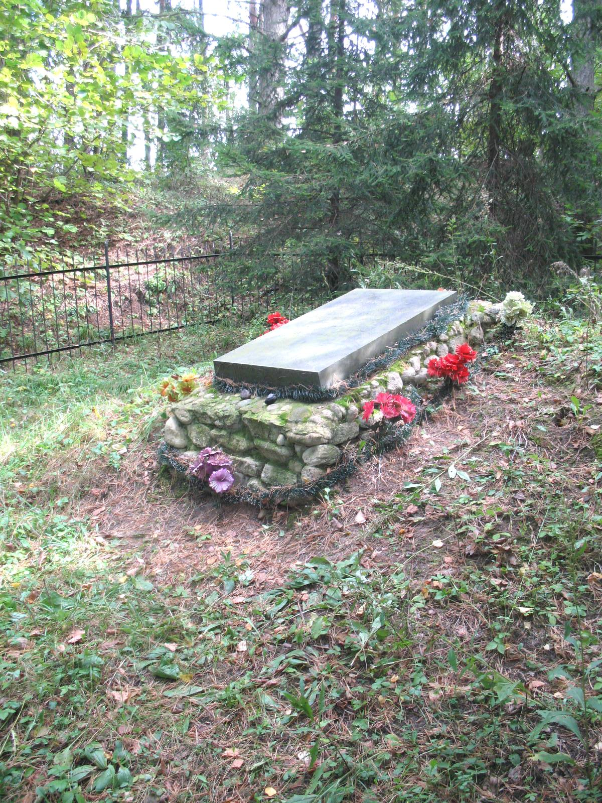 Памятник убитым нацистами евреям Логойска. Установлен на братской могиле убитых в 1950-е годы.